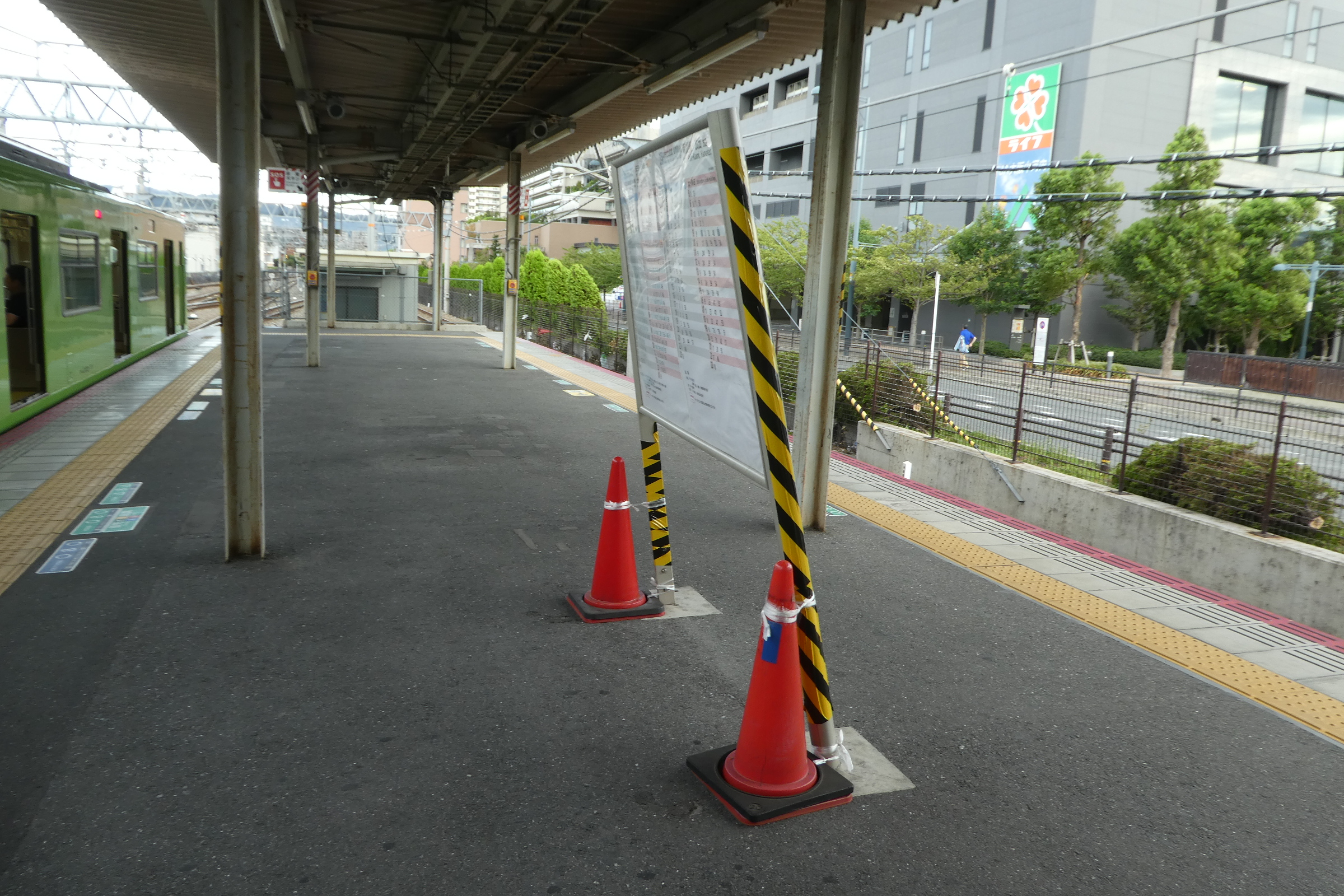 平成30年台風第21号の被害。JR大和路線久宝寺駅。